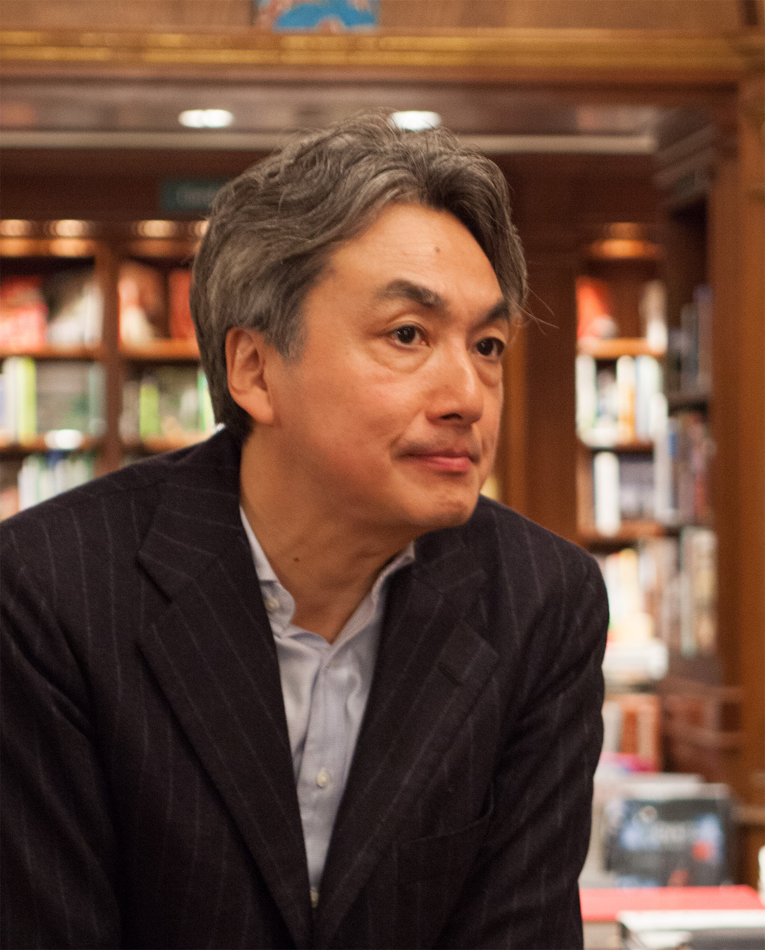 2010年2月ニューヨークのリッツォーリにて